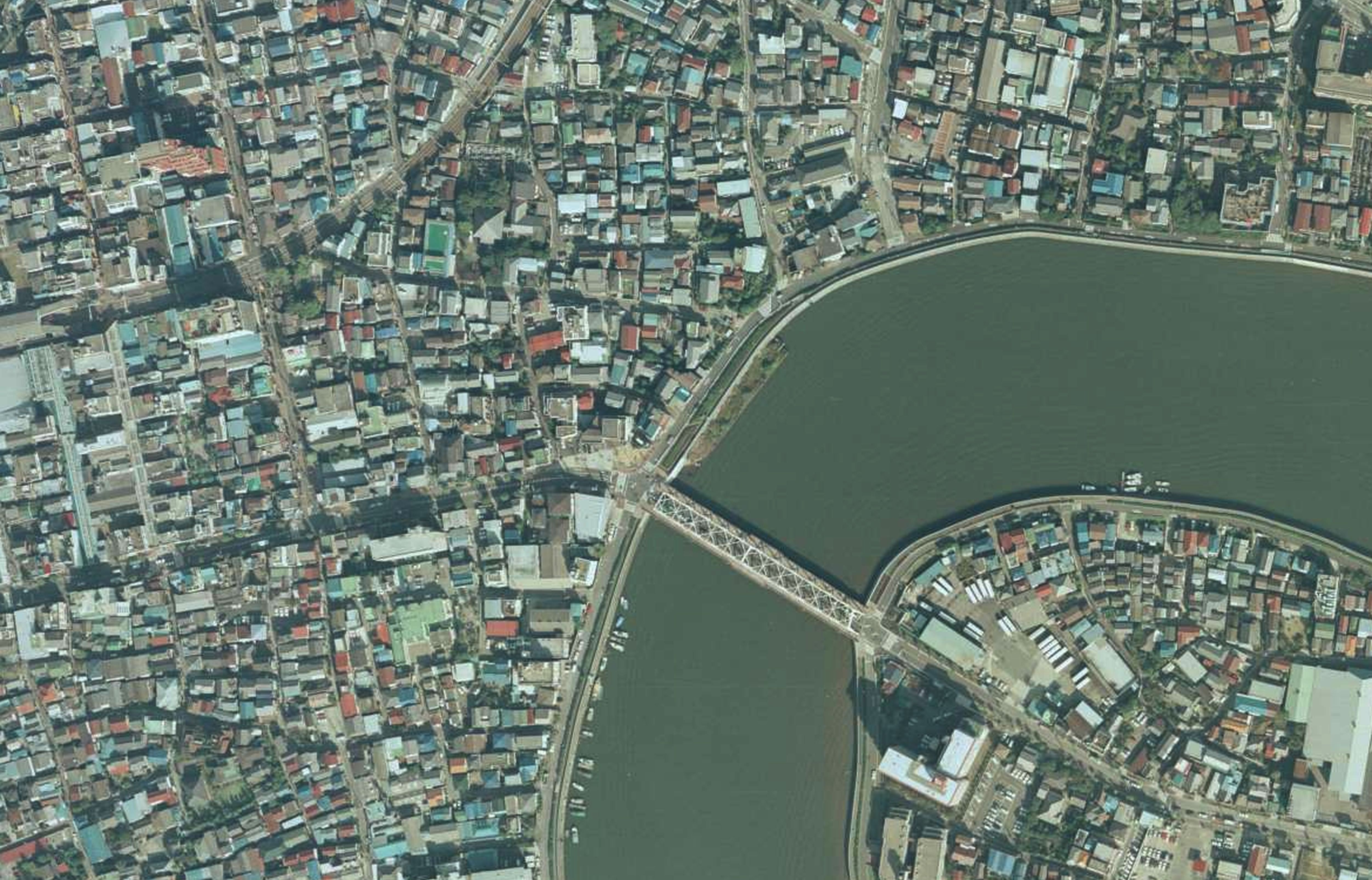 東京都葛飾区にある本奥戸橋の1989年の空中写真。